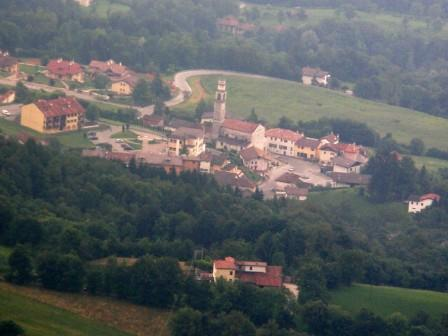 Il paese di San Gregorio visto dalle Ere